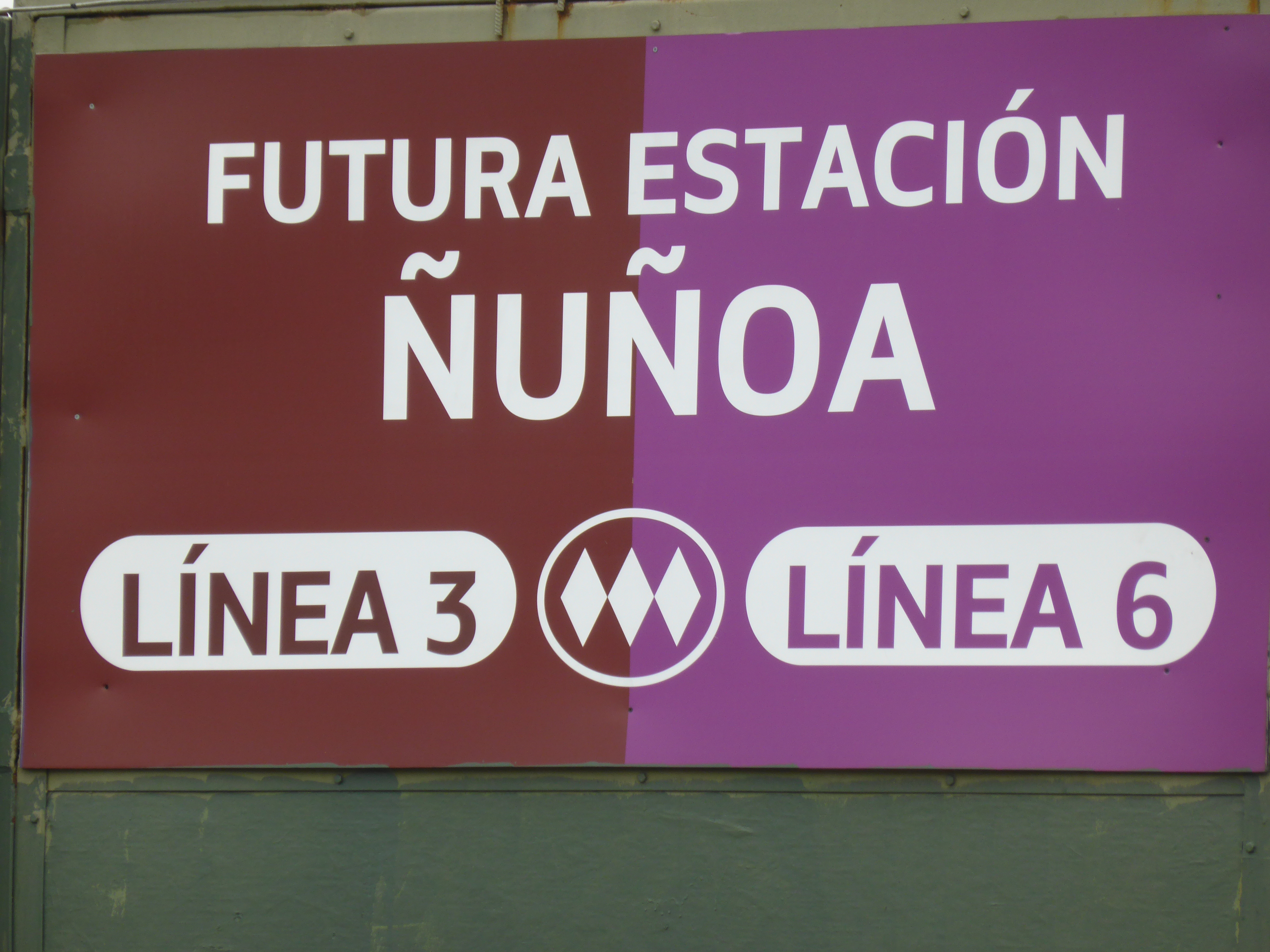 Junto a la Avenida Pedro de Valdivia, este cartel anuncia la futura estación ÑUÑOA, de Metro de Santiago.